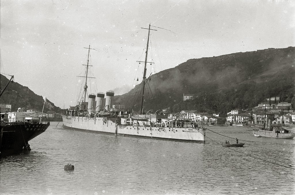 Título original: El buque de guerra 'Reina Victoria Eugenia' en Pasaia (1/1) Localización: Pasajes (Guipúzcoa)